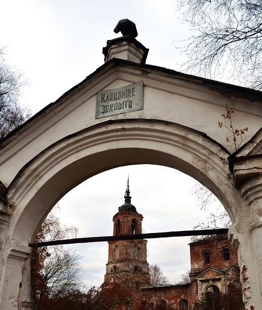 Никольское кладбище